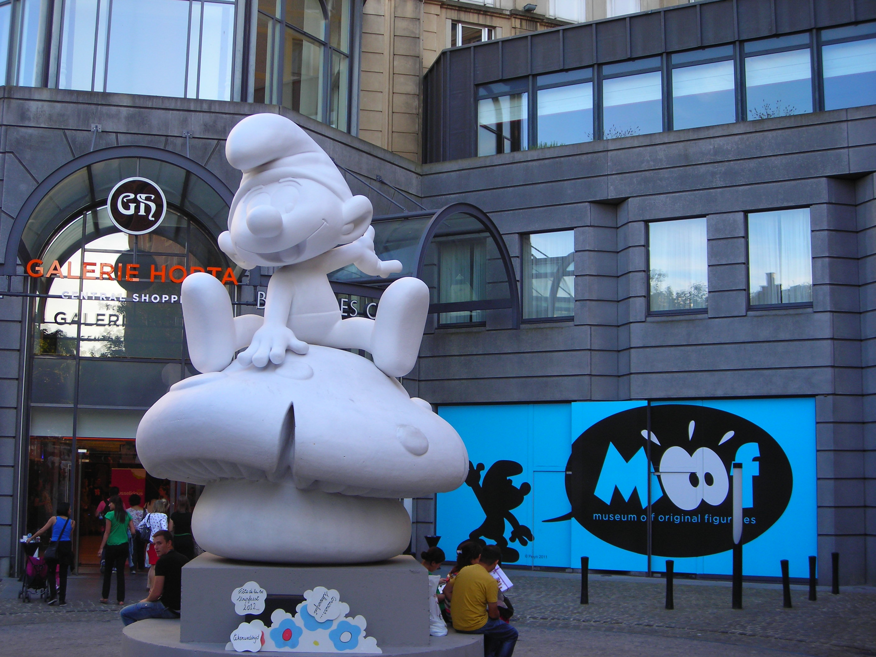 Museum of original figurines